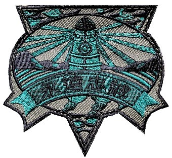 中文（台灣）: 中華民國海軍陸戰隊烏坵守備大隊臂章2011年低視度版。